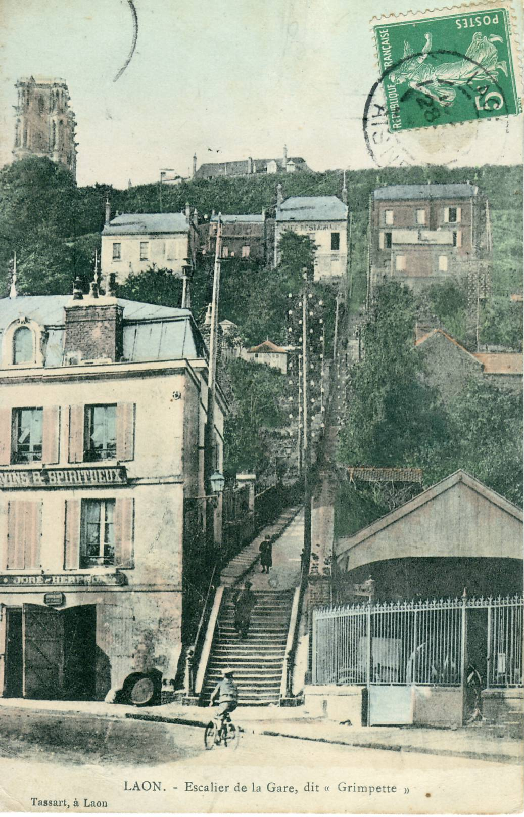 Carte postale ancienne éditée par Tassart LAON : Escalier de la Gare, dit "La Grimpette"